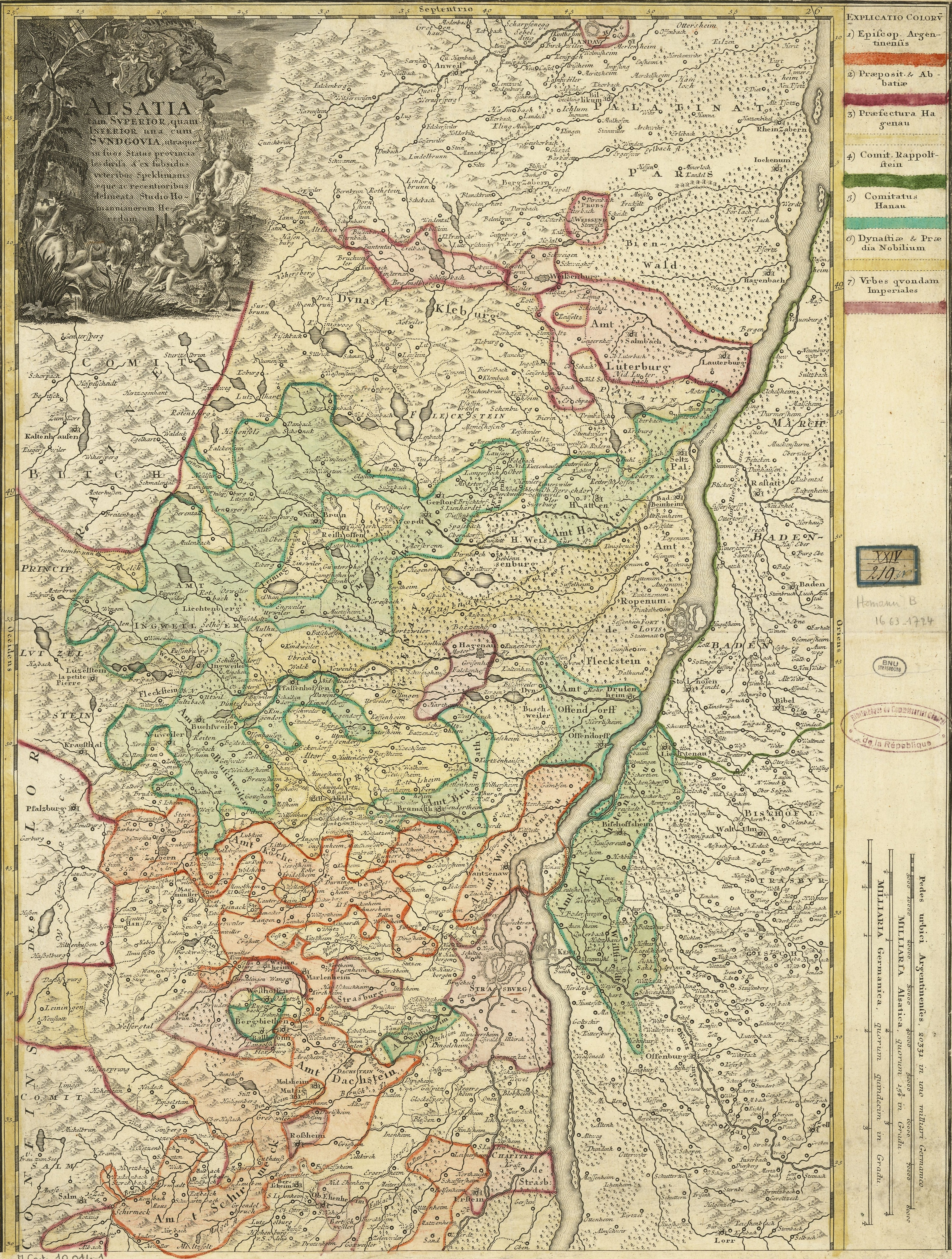 Carte de l’Alsace inférieure